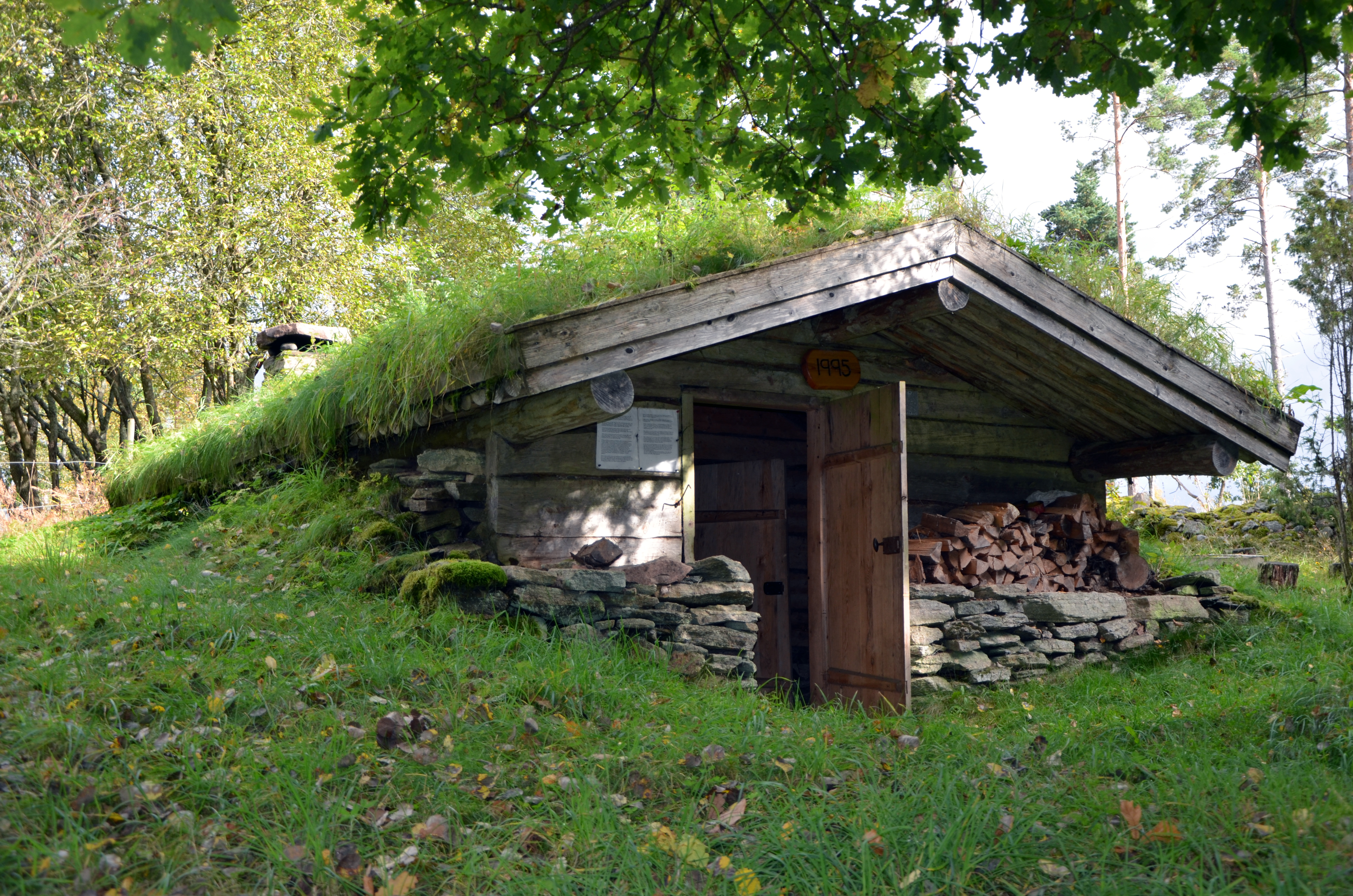 Jordkula Södra Sam